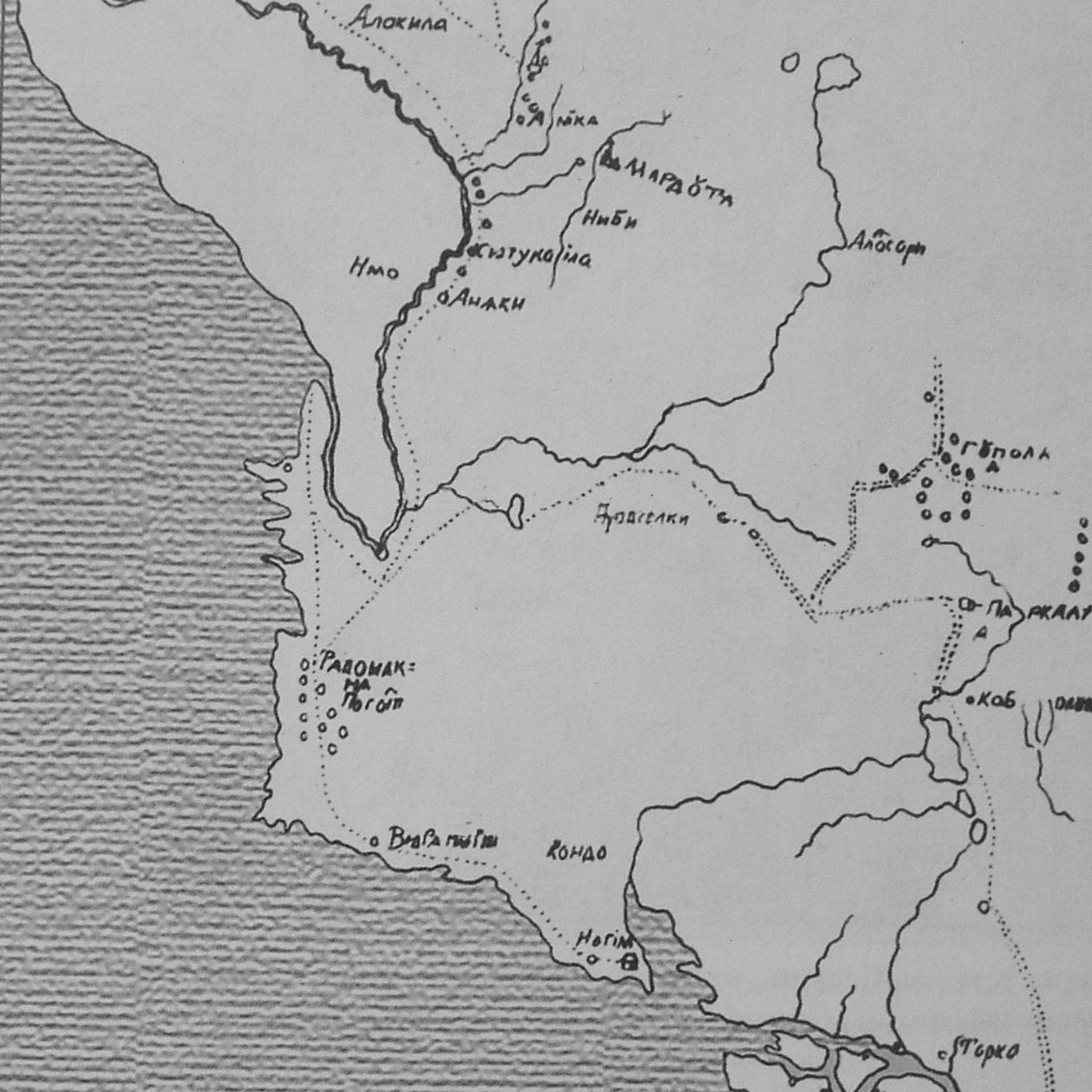 Фрагмент карты "Географический чертёж Земли Ижорской" ("Карта Шхонебека"). Скалькировано О. Растворовой с фотокопии хранящейся в Российской национальной библиотеке.